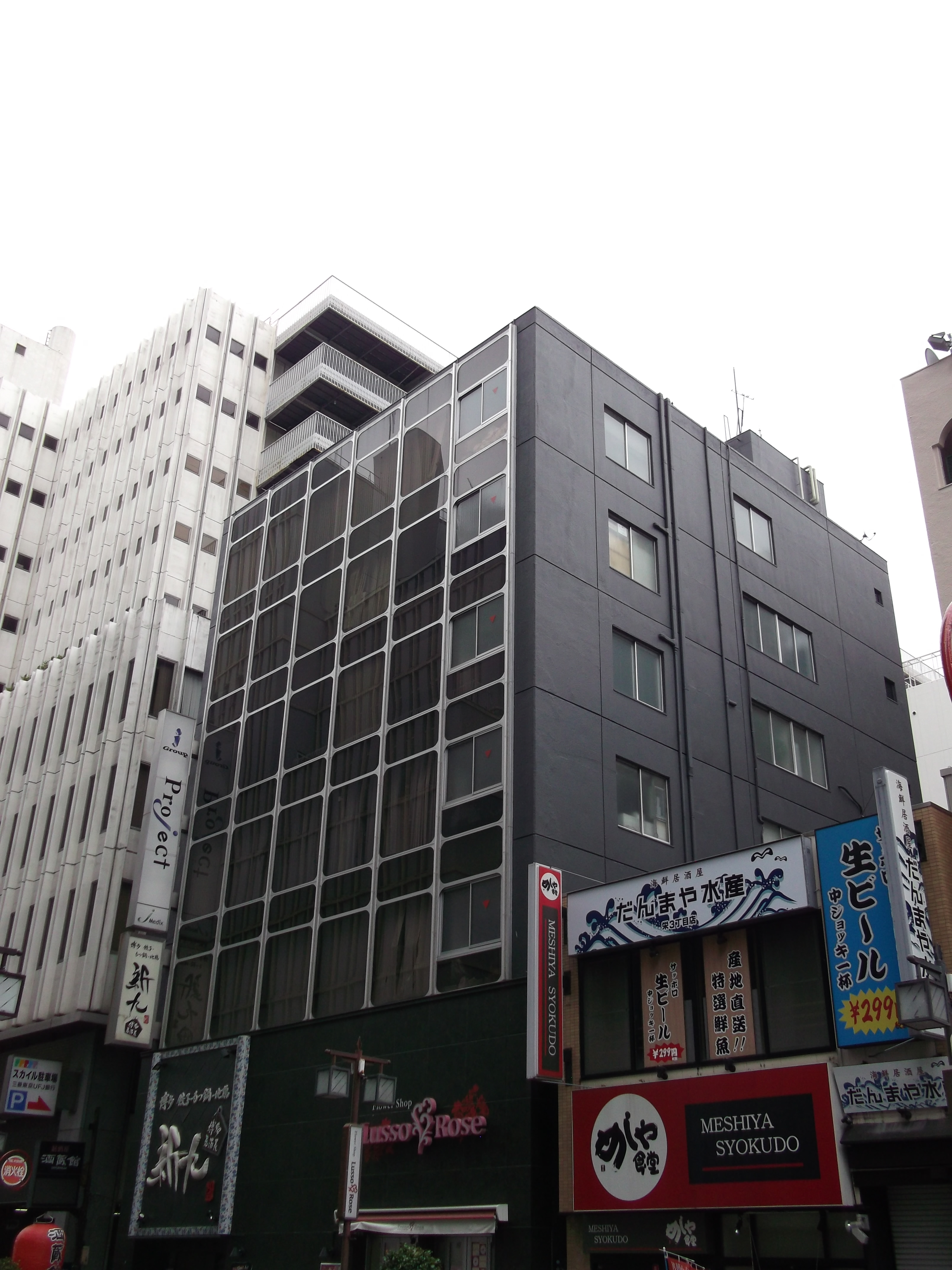 名古屋市中区栄三丁目のジェイグループホールディングス本社を西側公道南側より撮影